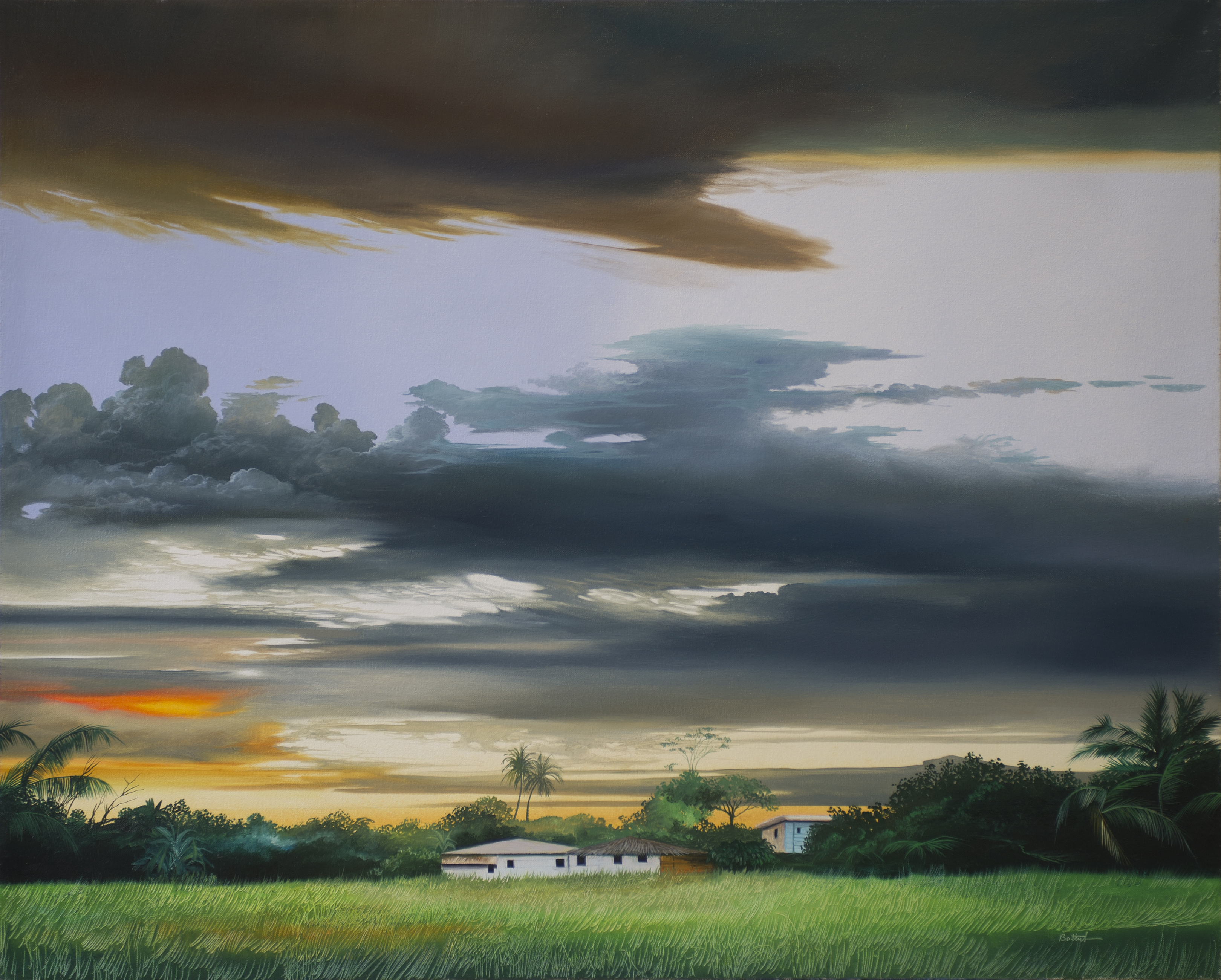 "La maison de Tikal, Mexique" 81x100 cm